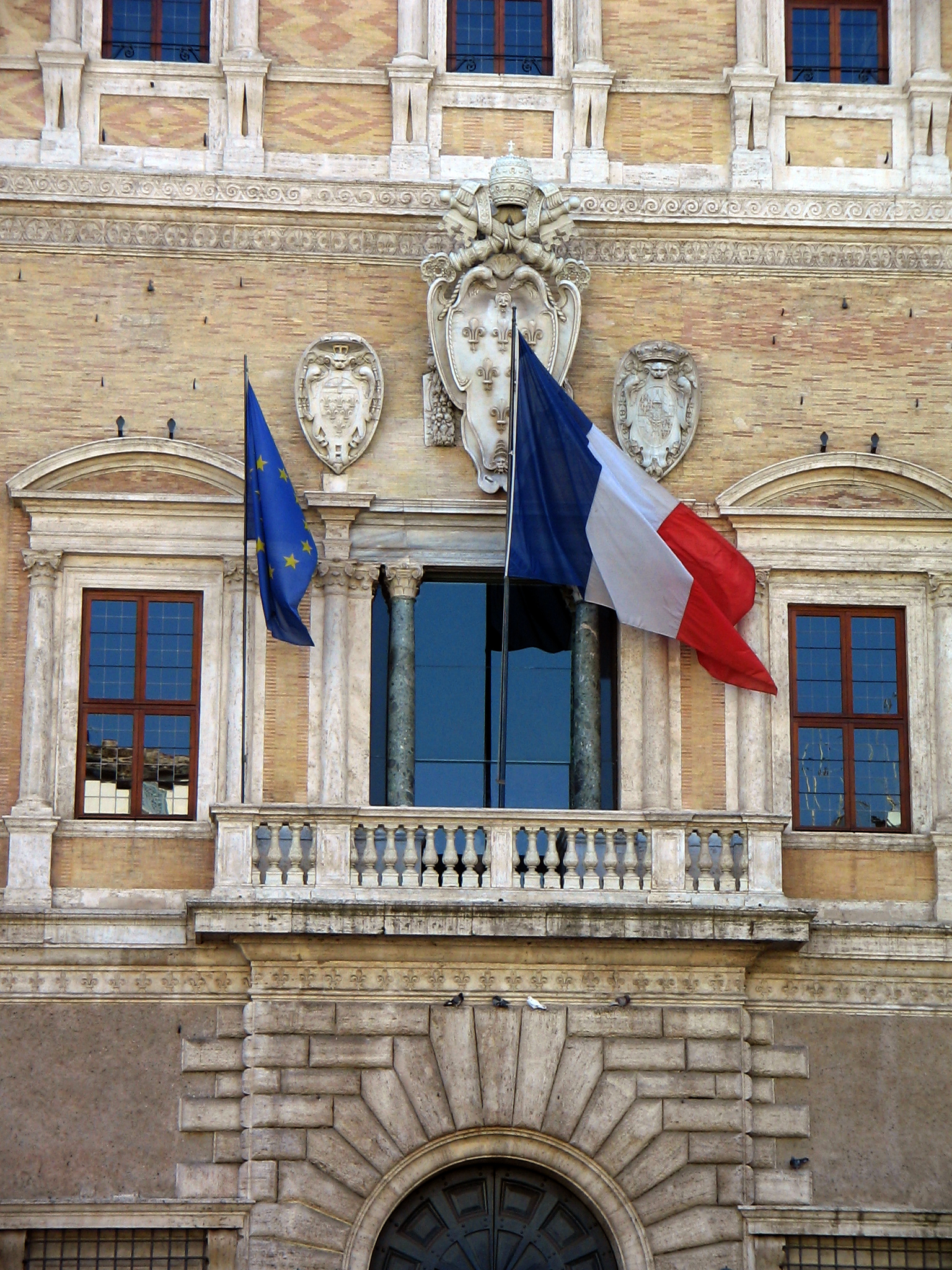 Piazza Farnese (Roma), Roma: il Palazzo Farnese (ambasciata francese), Particolare 16/X/2005